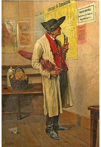 Rauch-Verbot, Öl auf Leinwand, 52 x 36 cm